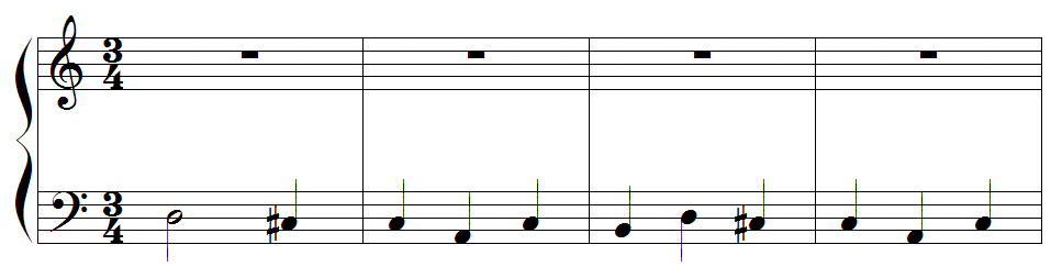 Anton Reicha - sujet de la fugue n°33 des 36 fugues, op.36